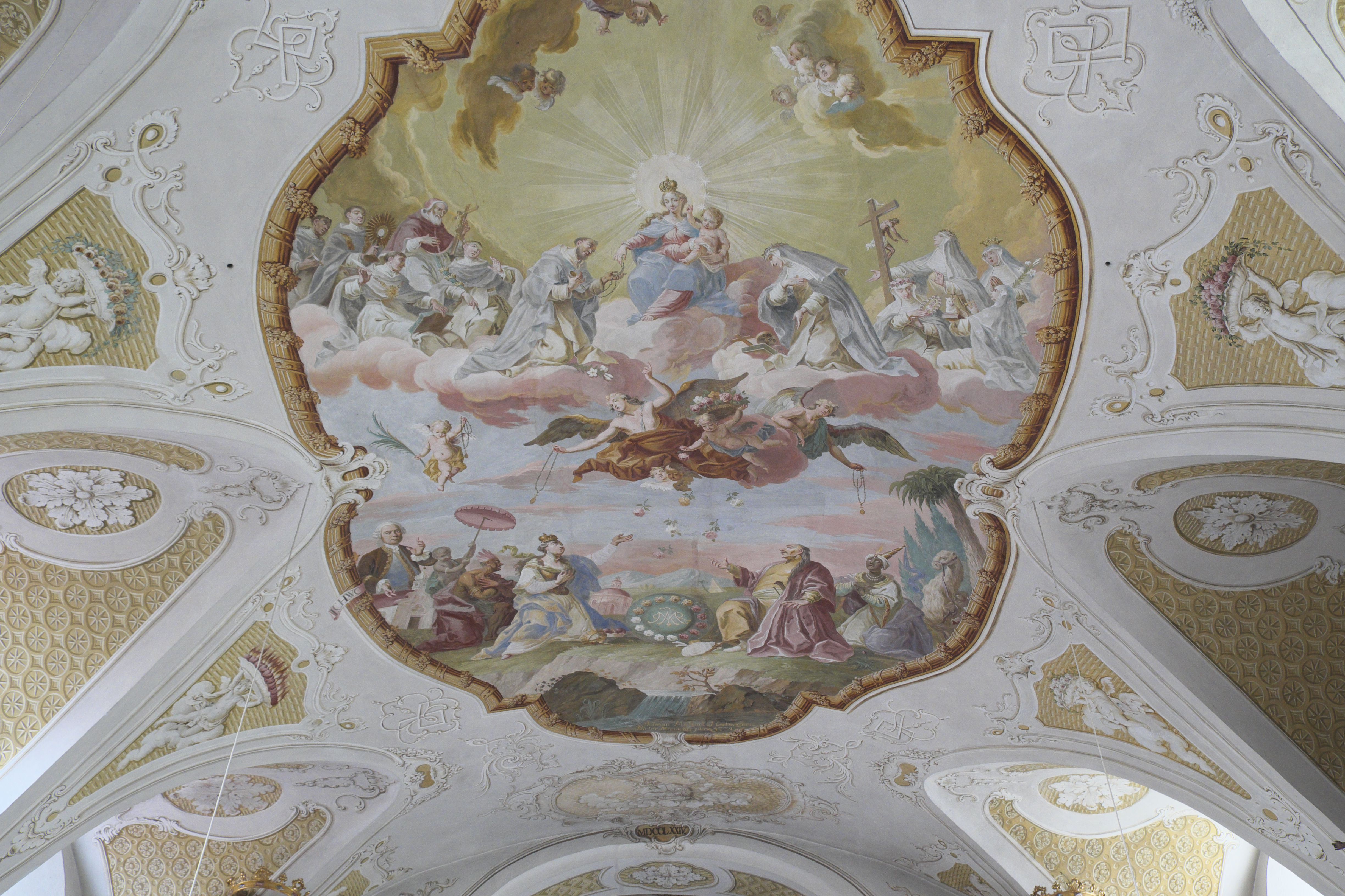 Ehemalige Dominikanerinnenklosterkirche St. Peter und Paul, heute Filialkirche, in Altenhohenau (Griesstätt) im Landkreis Rosenheim (Bayern/Deutschland), Deckenmalerei